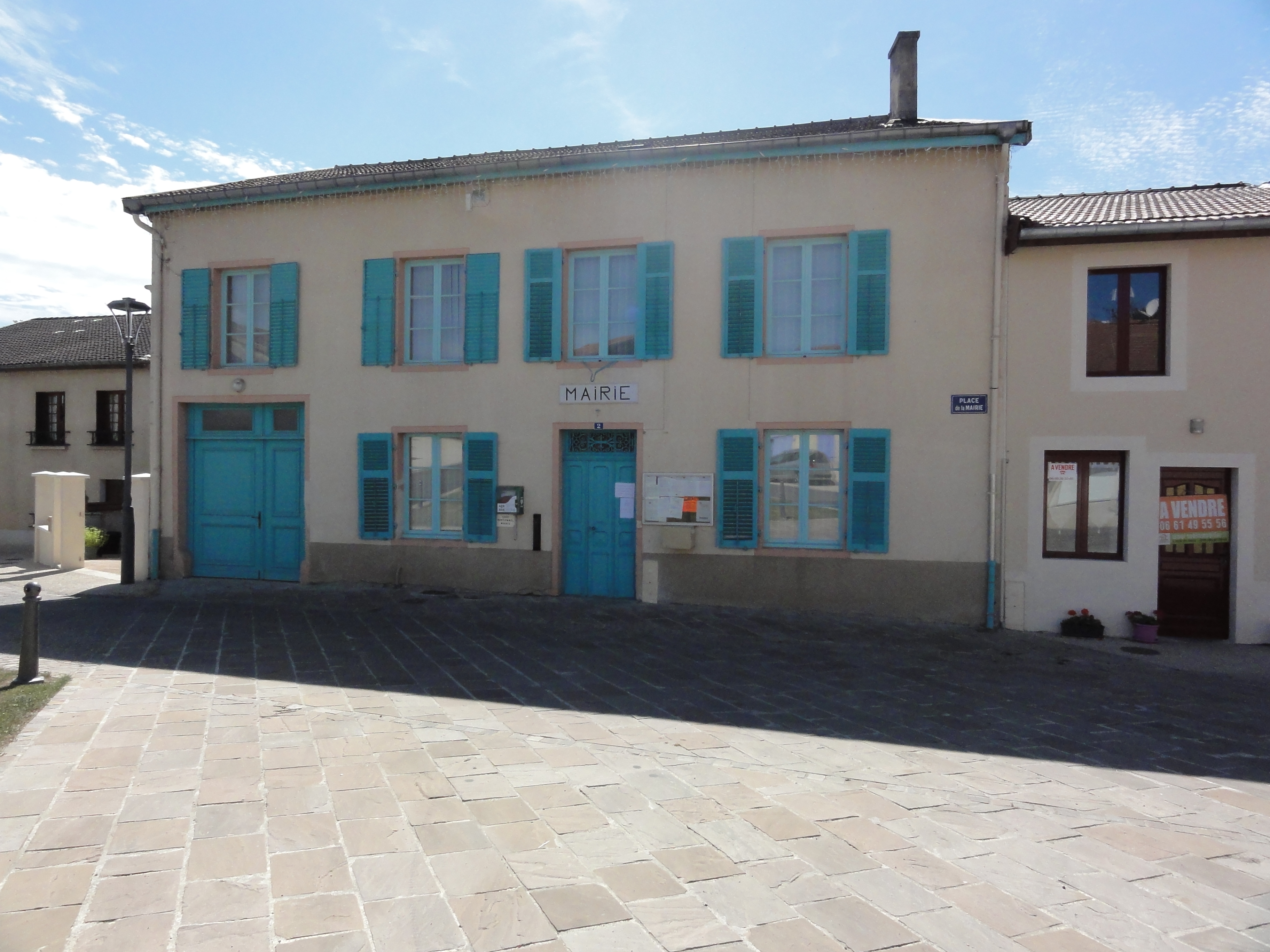 Le Bouchon-sur-Saulx (Meuse) mairie